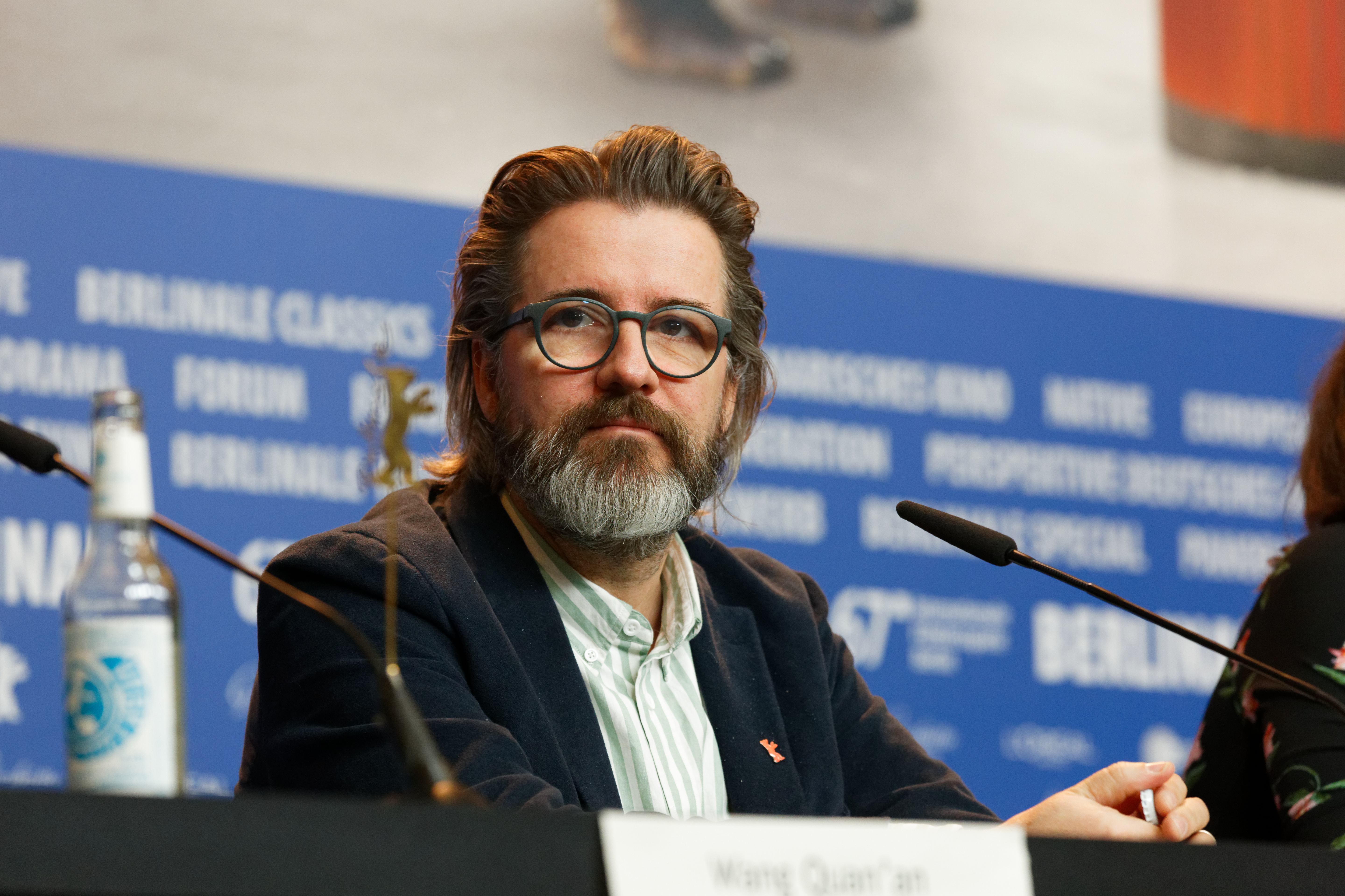 Ólafur Elíasson bei der Pressekonferenz der Internationalen Jury bei der Berlinale 2017